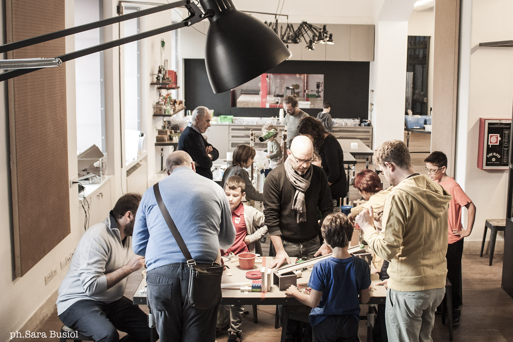 Laboratorio educativo nel Museo nazionale della scienza e della tecnologia Leonardo da Vinci, Milano.